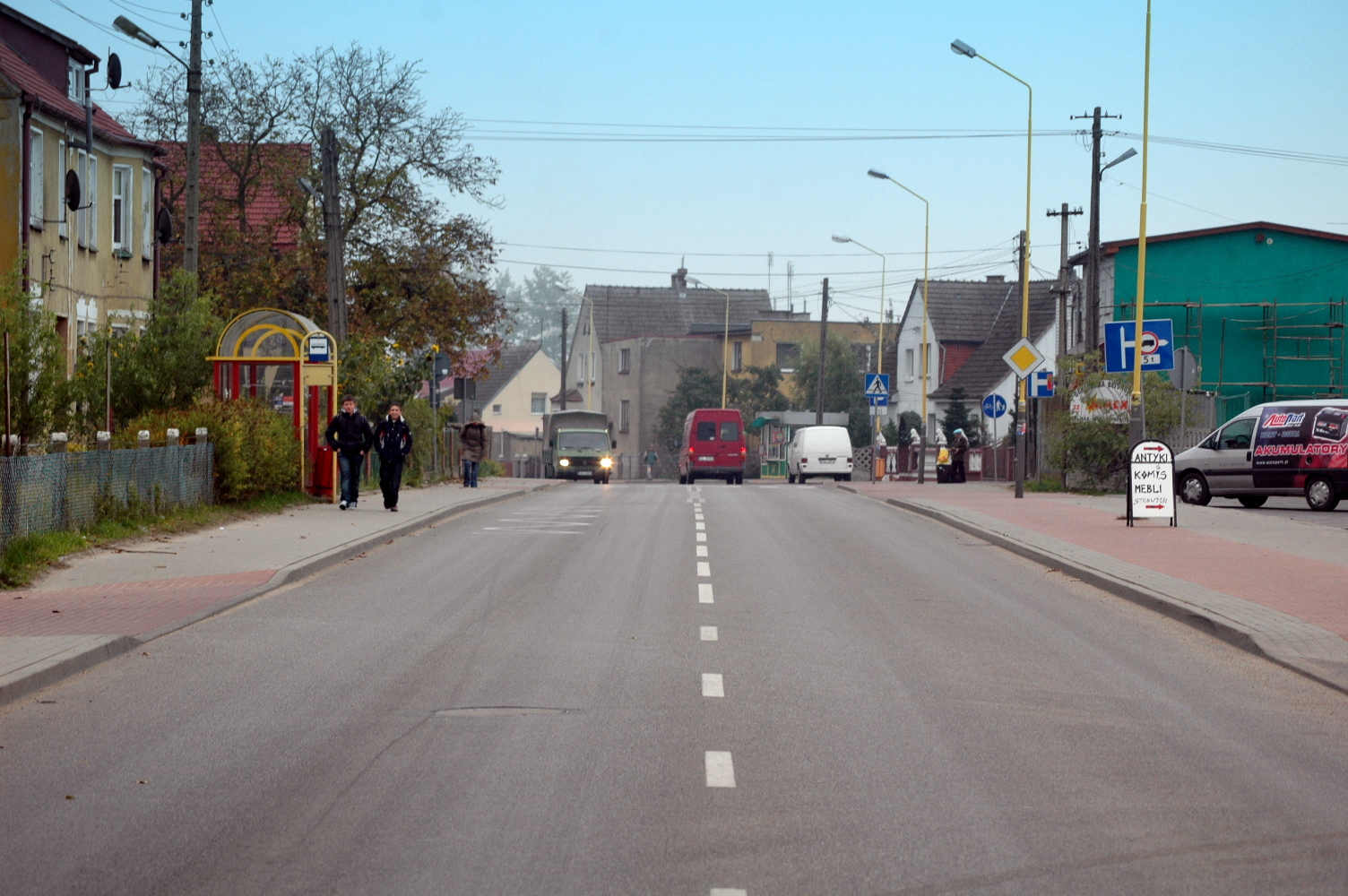 Ulica Bohaterów Warszawy w Nowogardzie.